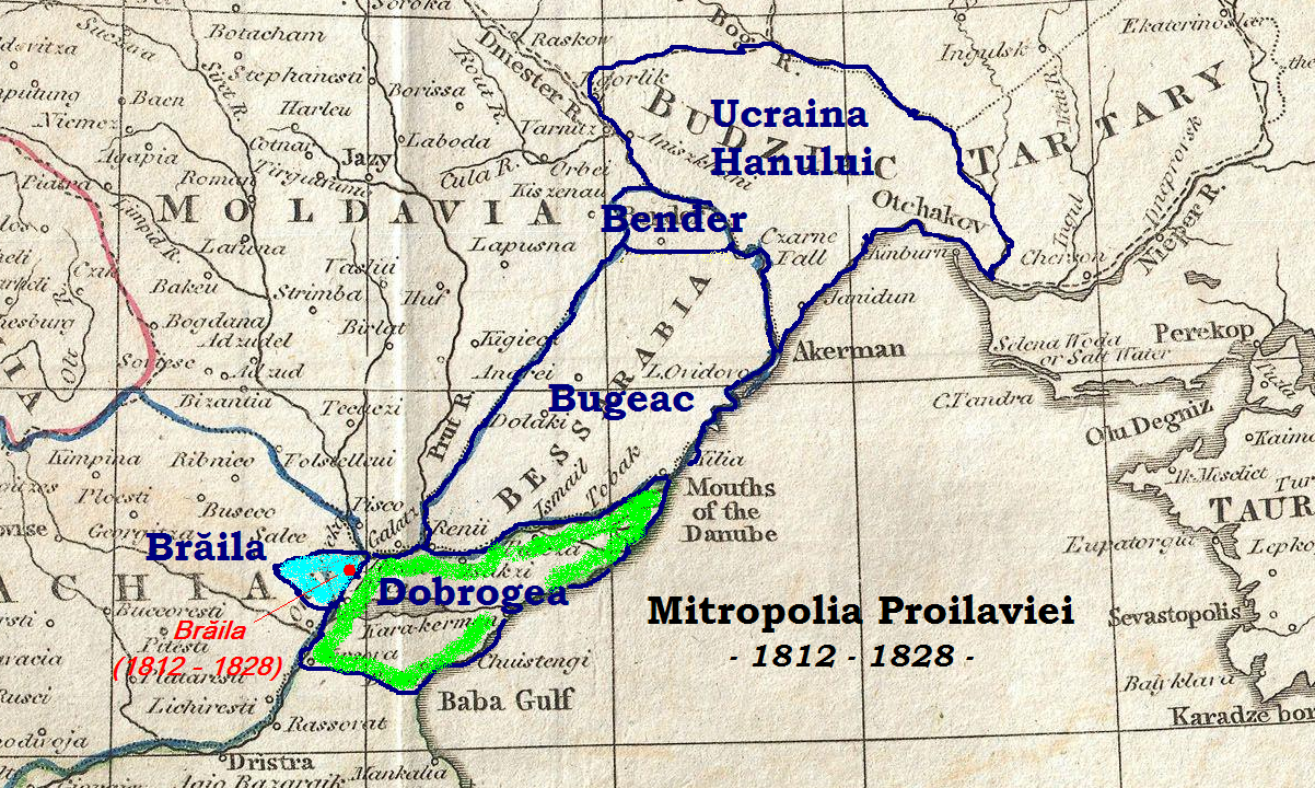 Harta arată teritoriile aflate sub jurisdicţia Mitropoliei Proilaviei, între anii 1812 - 1828